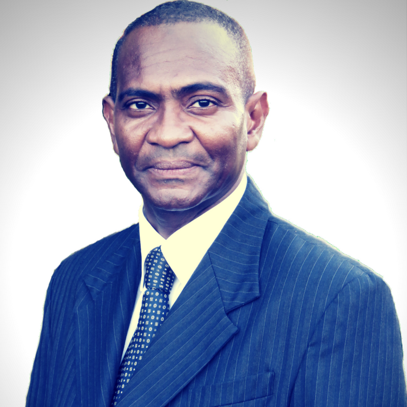 Portrait de Ibrahim Aboubacar